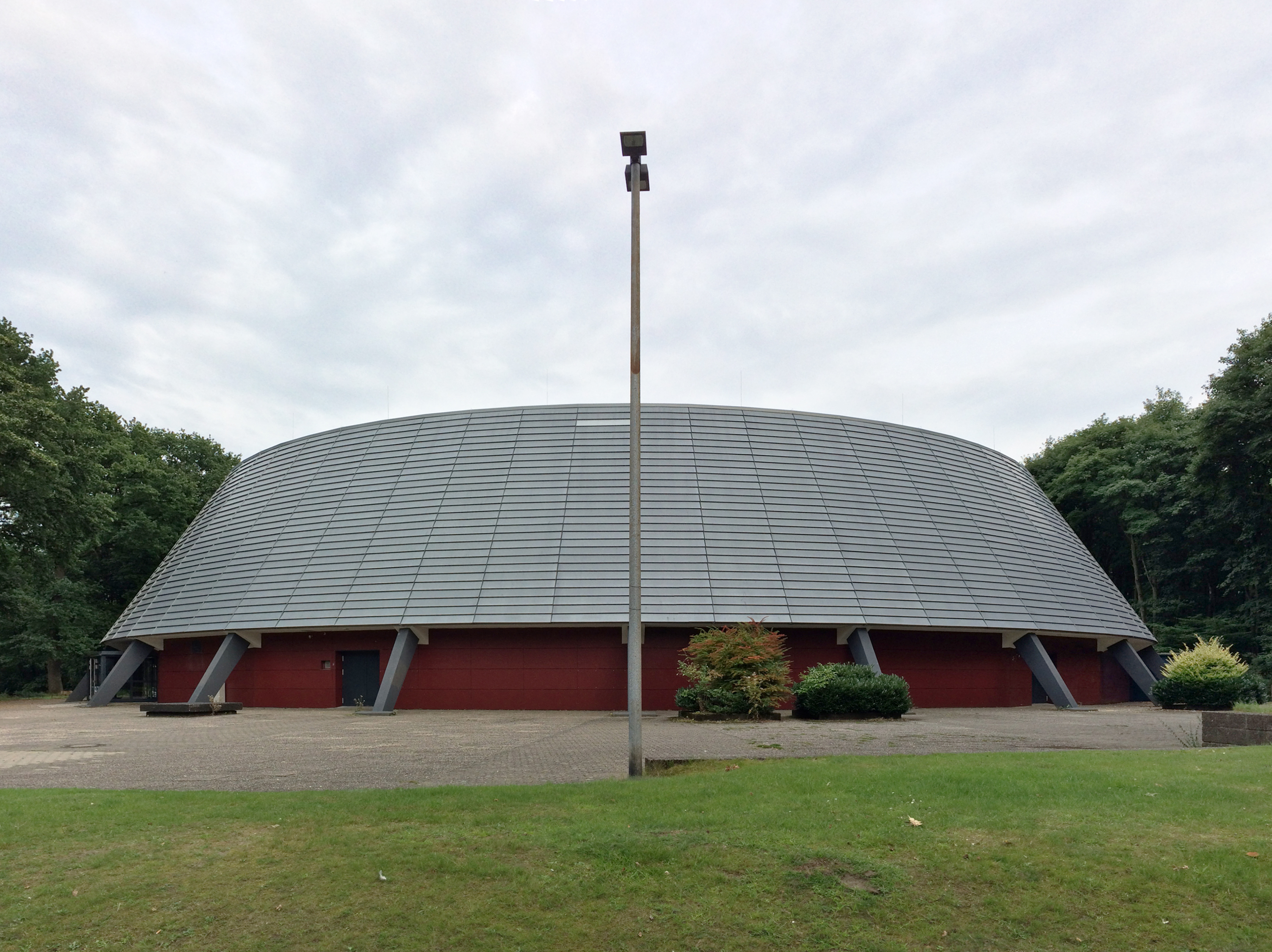 Rundsporthalle, Eduard-Weitsch-Weg, Hagenstraße, Marl-Mitte, Umbau 2011